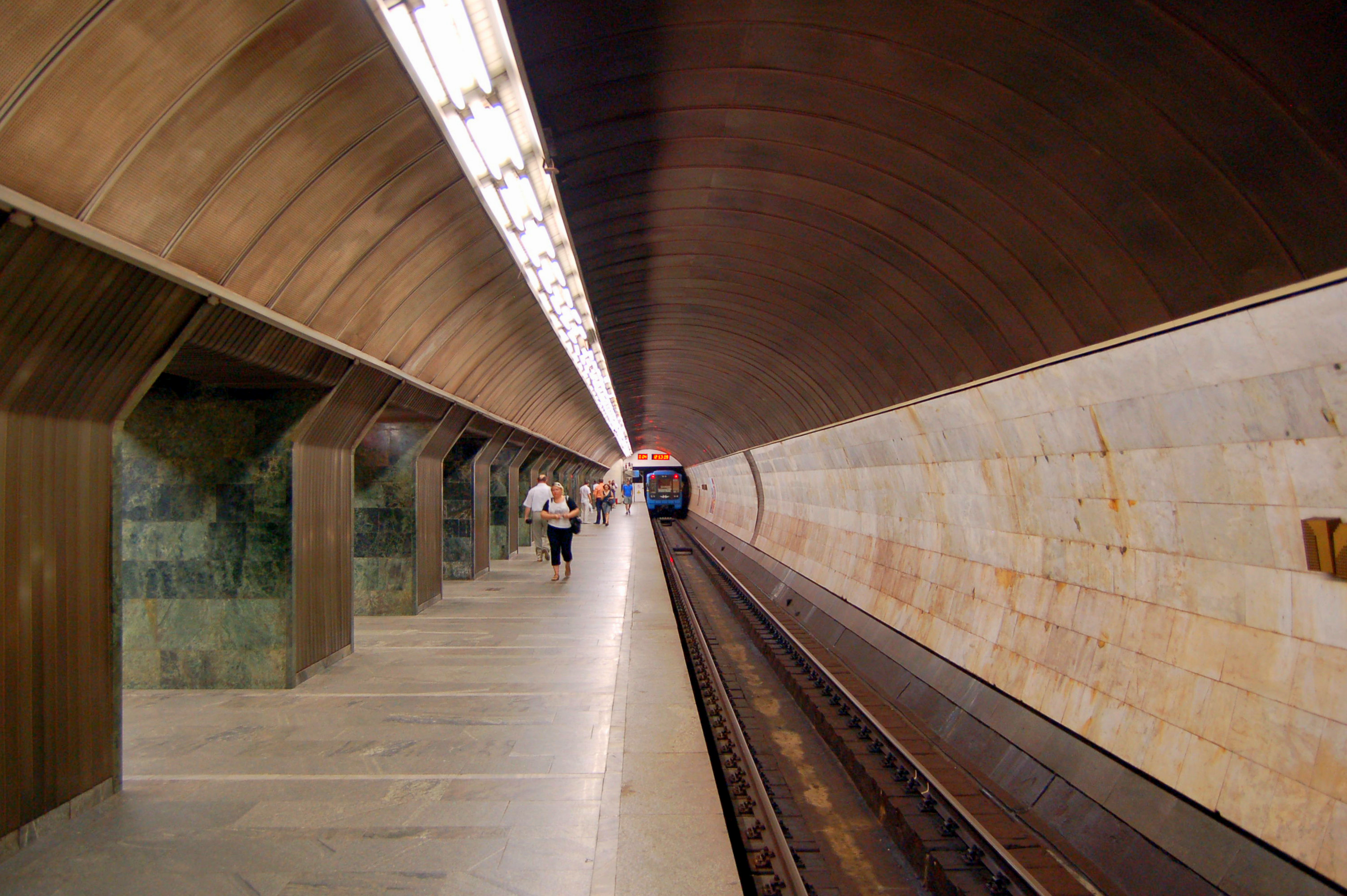 Cтанция метро «Дворец спорта», посадочная платформа